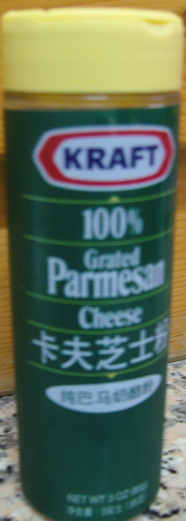 芝士粉